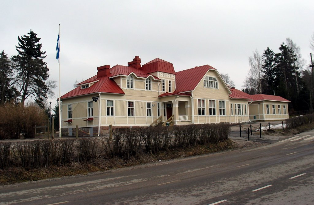 Kungsgårdsskolan Espoon Kurttilassa.